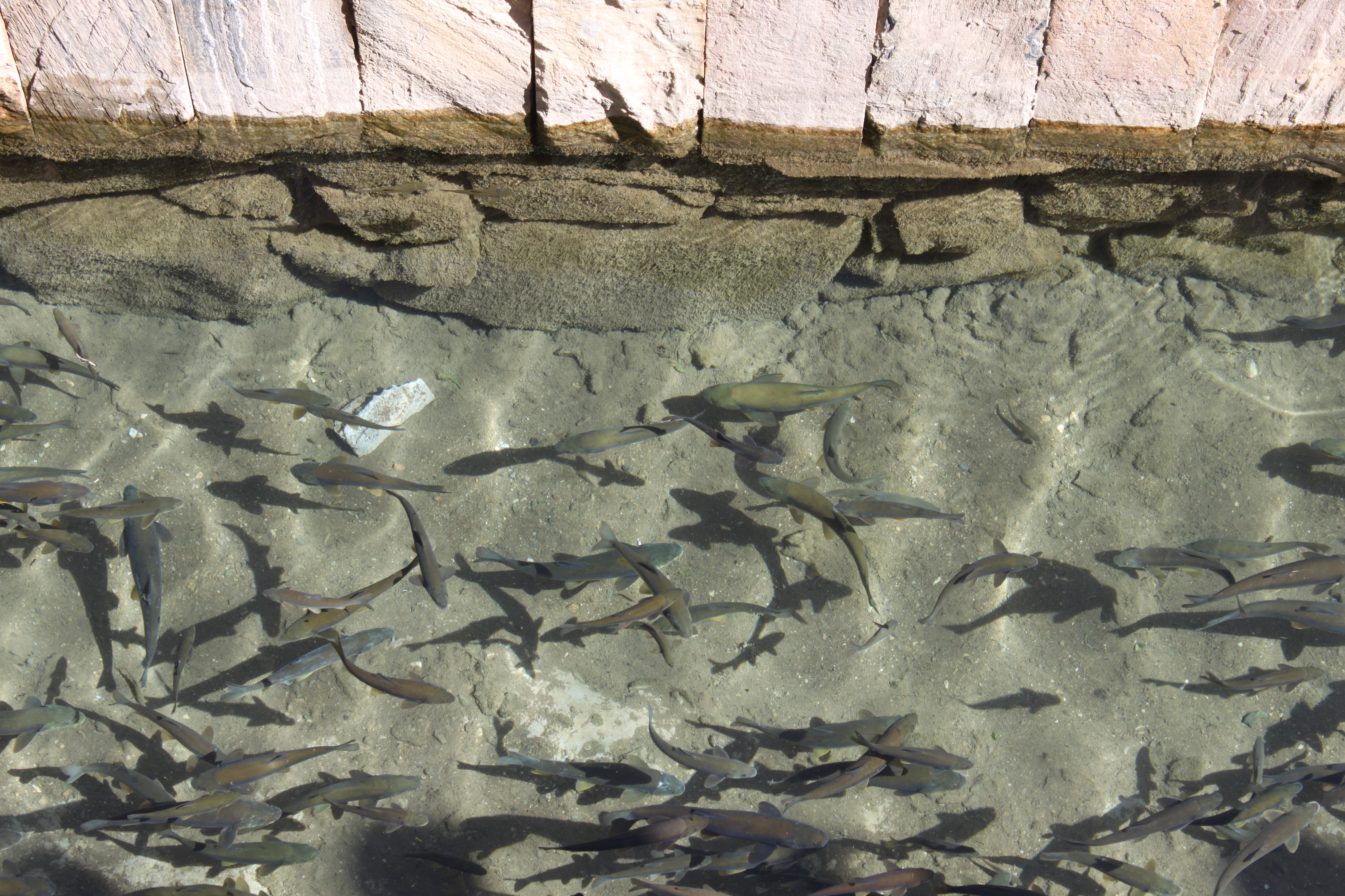 Les "poisson sacrés" dans un bassin sur le site de la source Tchachma à Nourata